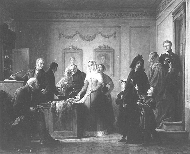 Ferdinande von Schmettau opfert ihr Haar auf dem Altar des Vaterlandes 1813, von Gustav Graef. Graustufen-Reprophoto des Originalgemäldes (ÖL auf Leinwand 125×98 cm.).